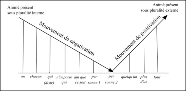 Tableau sur le mouvement de négativation des pronoms. C'est une citation d'olivier Soutet, La syntaxe du français, PUF, 1989, ISBN 2 13 045687 1